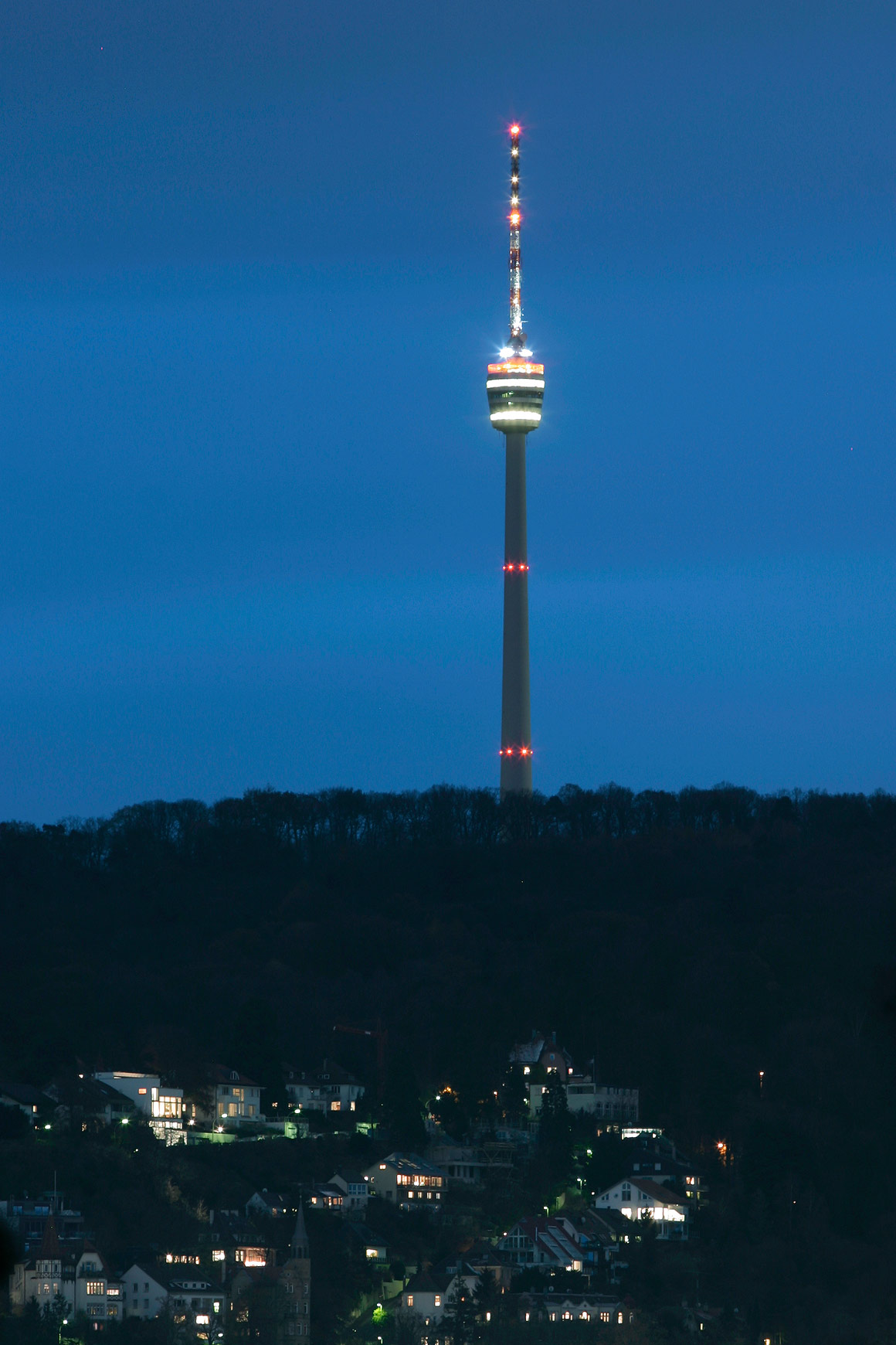 TV tower, Fernsehturm Stuttgart, Germany